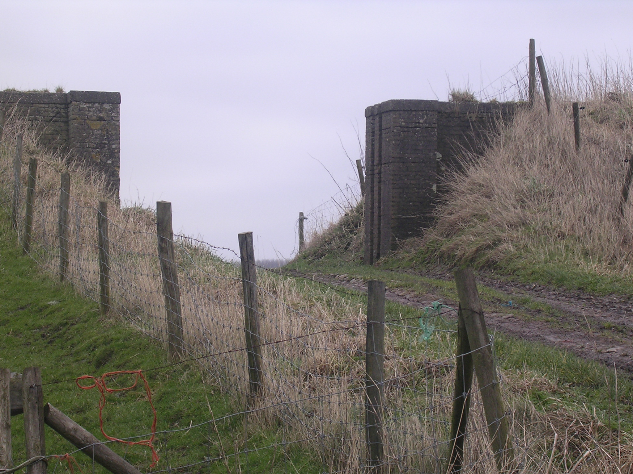 Weingat yn de âlde seedyk, letter de binnendyk fan de Ingwierrumer polder